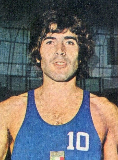 EDIS CALCIATORI 1975/76-Figurina n.349- ZANATTA - BASKET -Rec